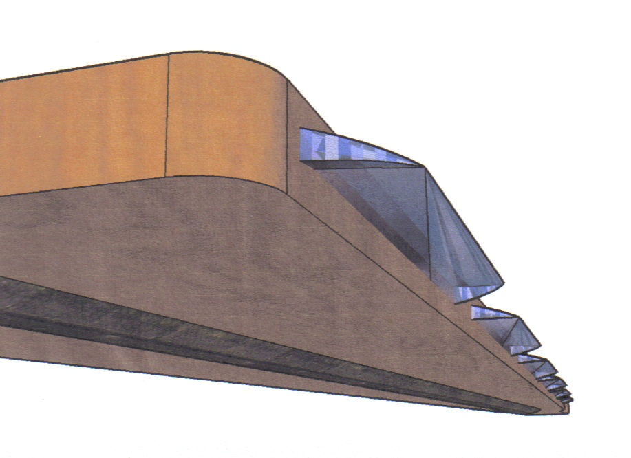 Obsidianschwert1